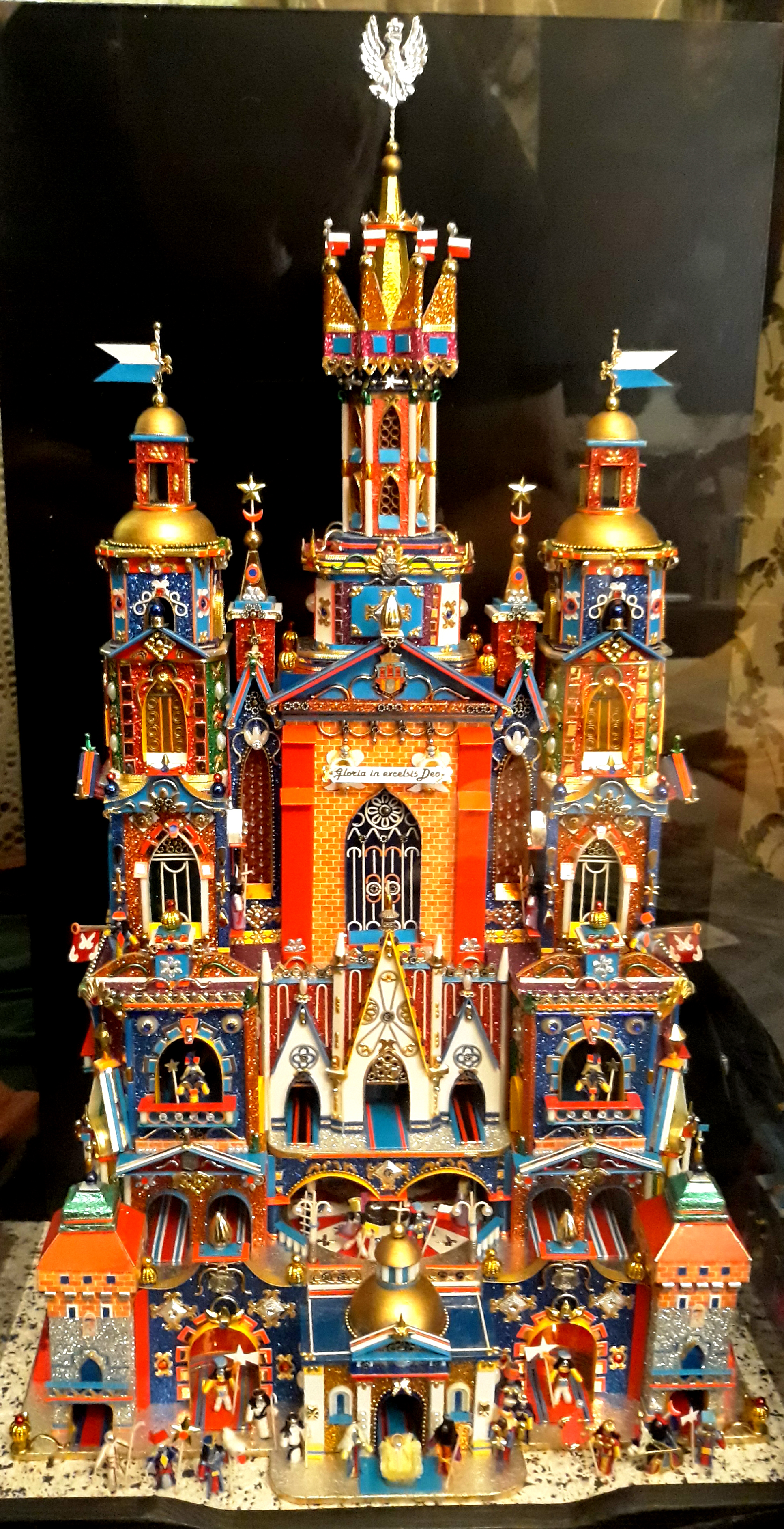 Szopka krakowska - elementami architektury nawiązująca zgodnie z tradycją do znanych obiektów miasta Krakowa.